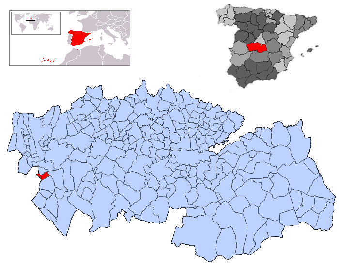 Navalmoralejo en la provincia de Toledo